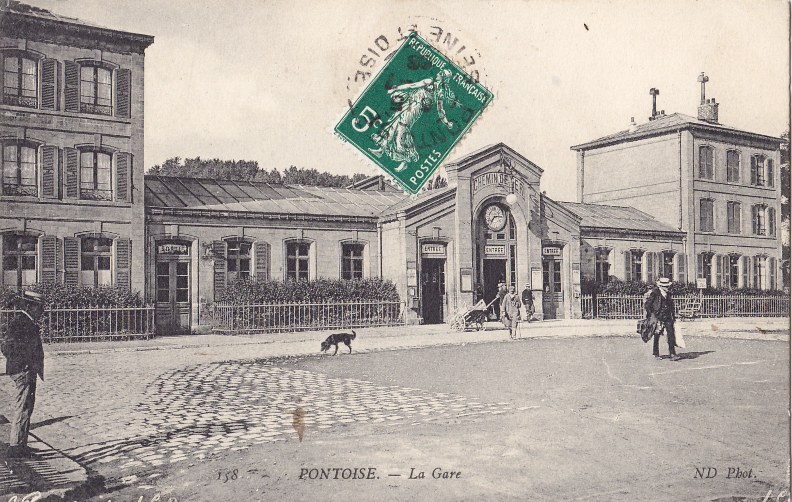 Carte postale ancienne éditée par ND, n°158 : PONTOISE - La Gare